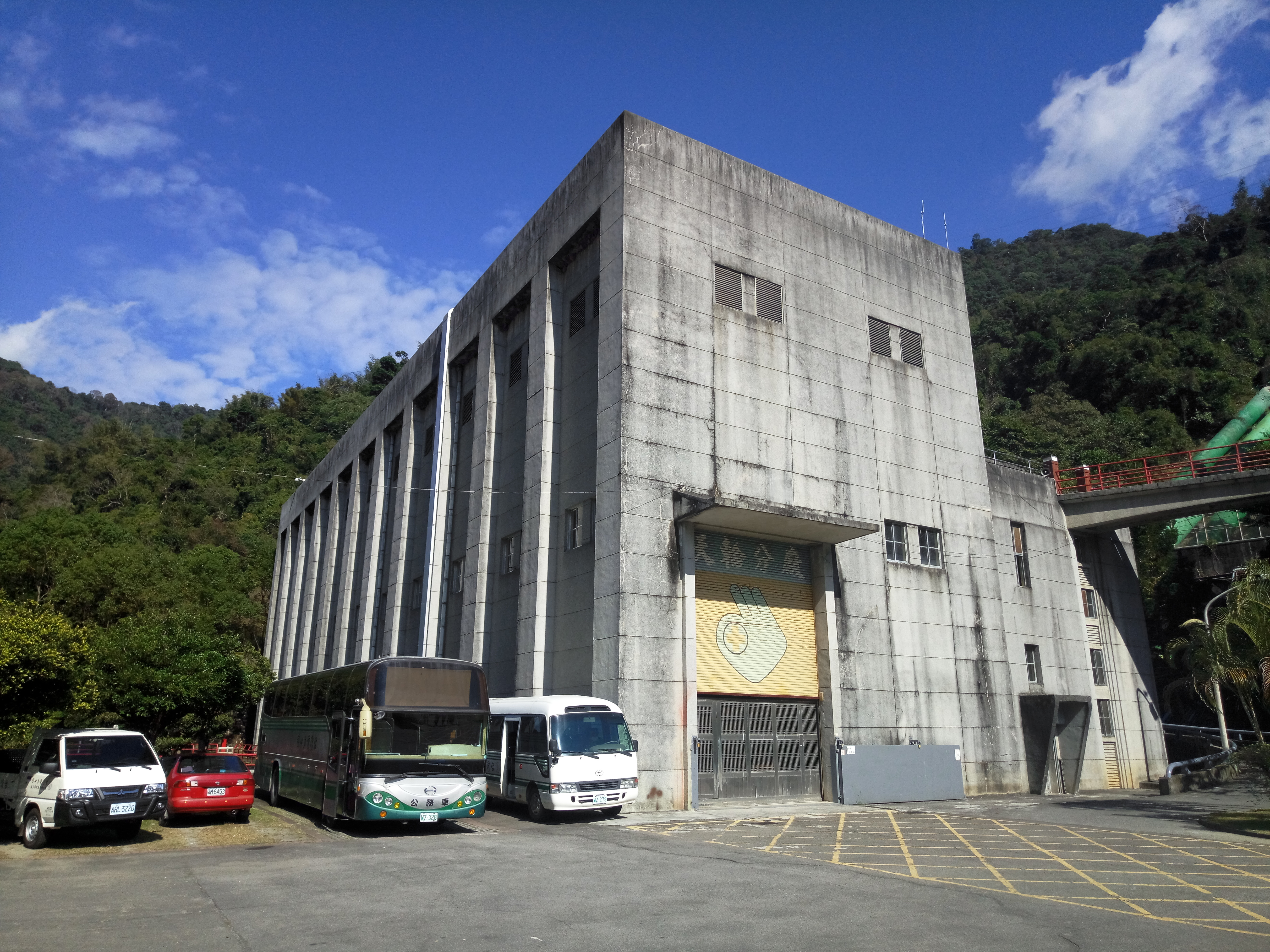 大甲溪發電廠天輪分廠一號至四號機發電廠房。